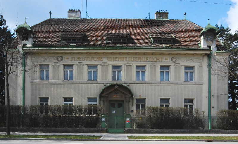 Gebäude der Städtischen Wienflussaufsicht an der Hauptstraße in Penzing (Wien)